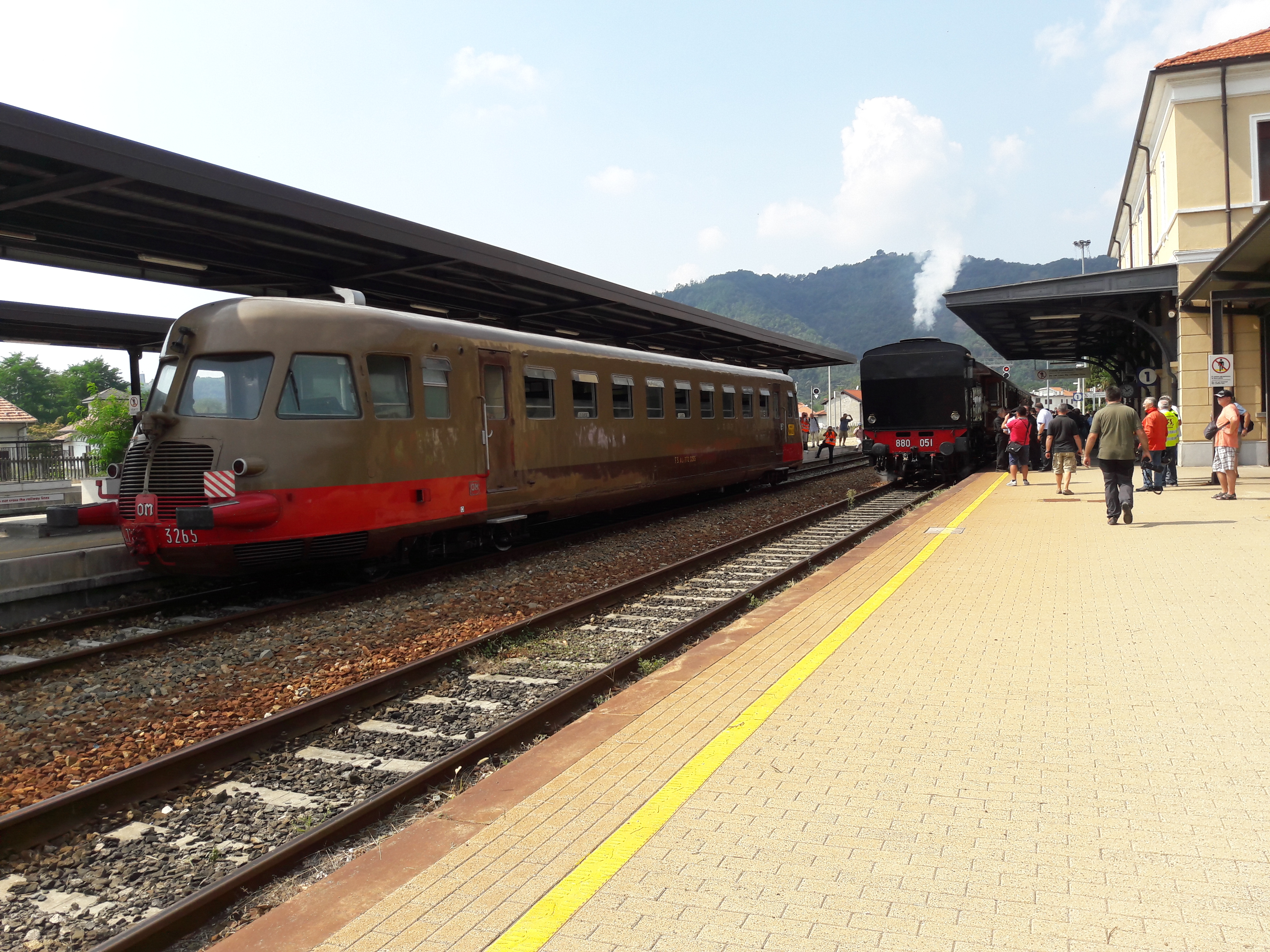 In occasione della festa del 130° anniversario della ferrovia Novara-Varallo, la stazione di Romagnano Sesia vede l'incrocio dell'ALn 772.3265 sul binario 2 con la Gr 880.050 con carrozze Centoporte sul binario 1.